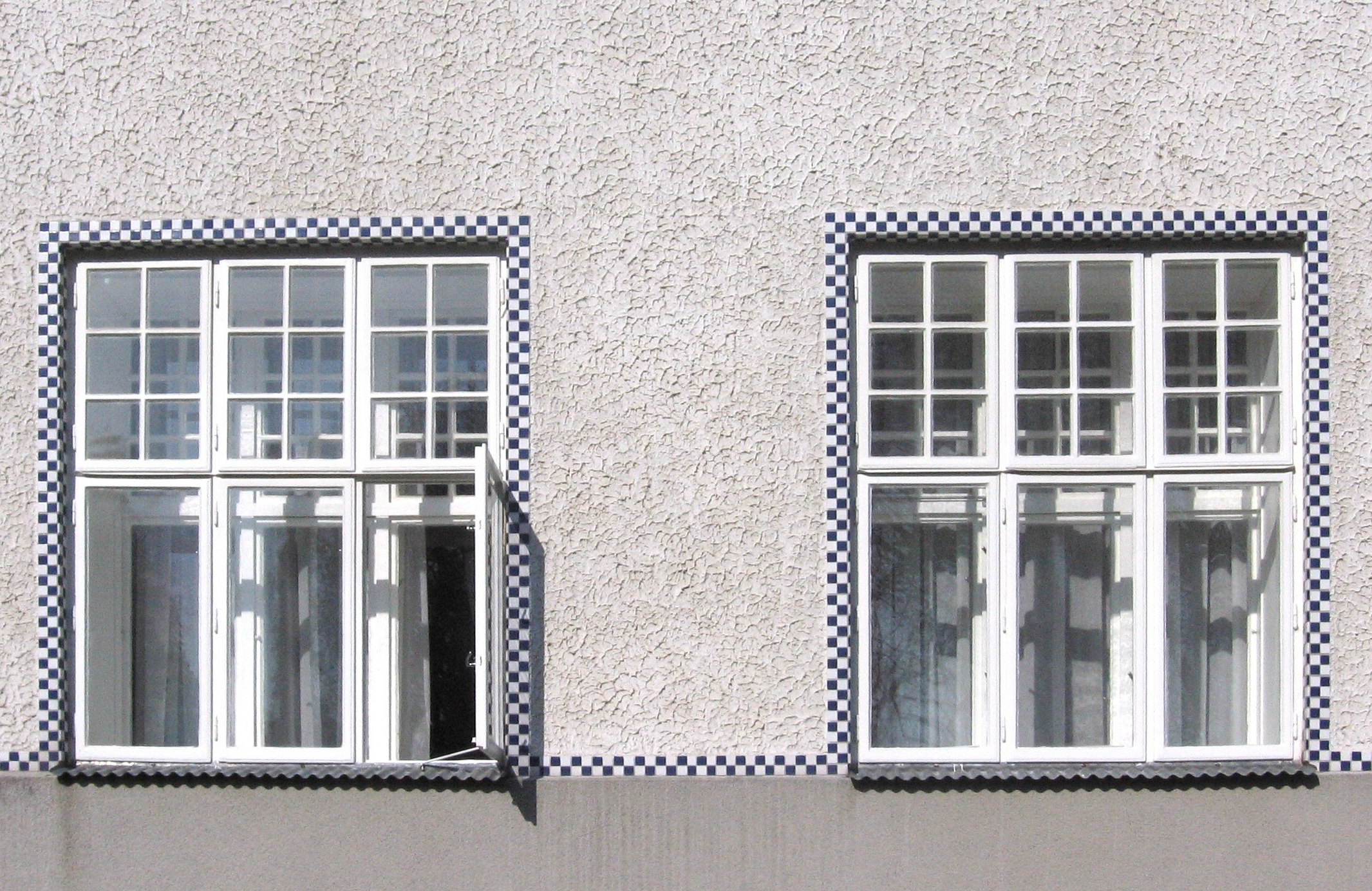 Sanatorium Purkersdorf).